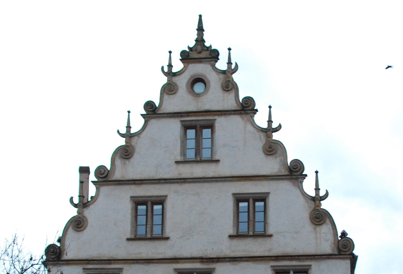 photo prise lors du marché de noel 2014.